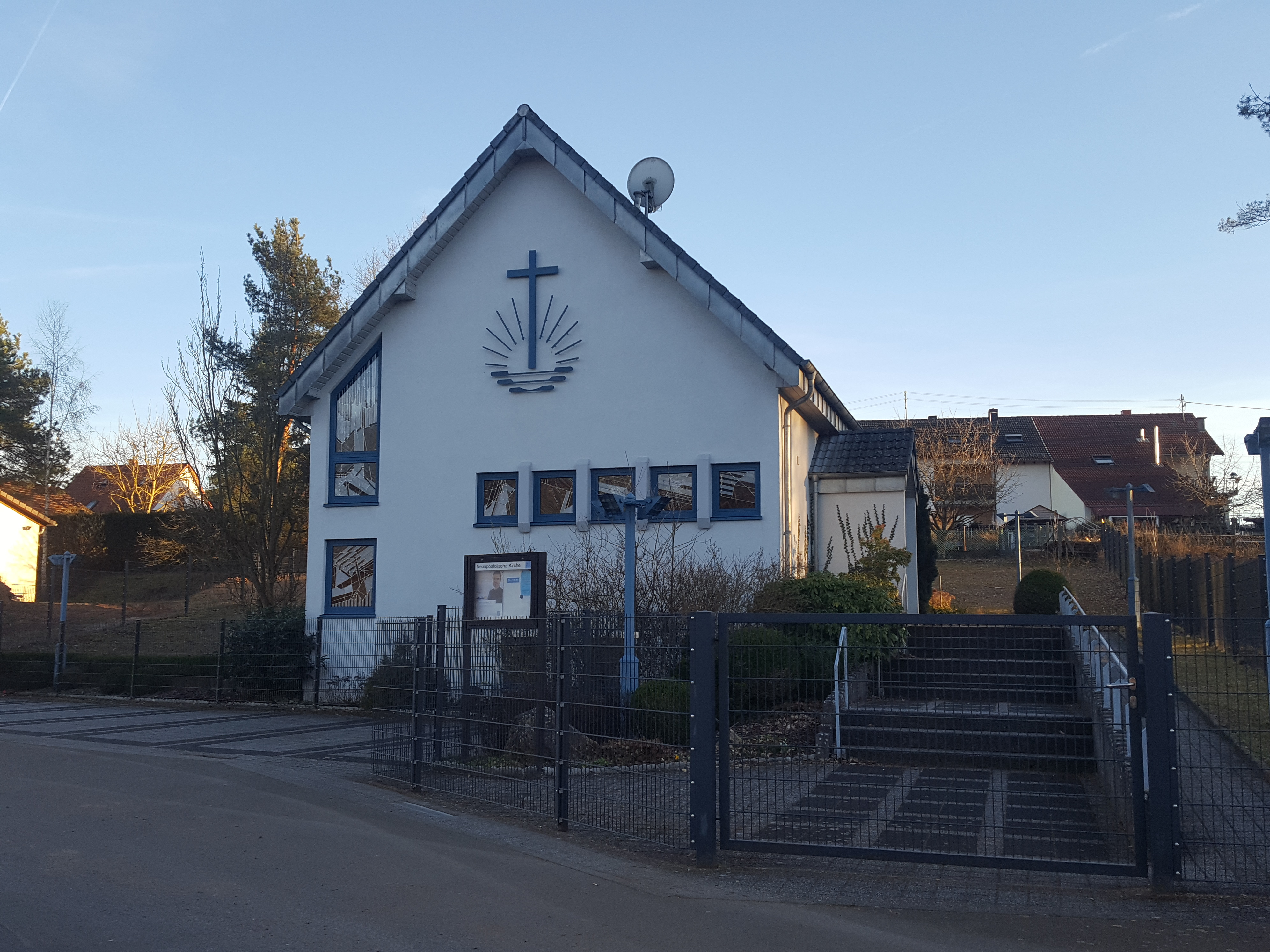 Neuapostolische Kirche(Gebaut 94/95 , bis März 2019 als Kirche)